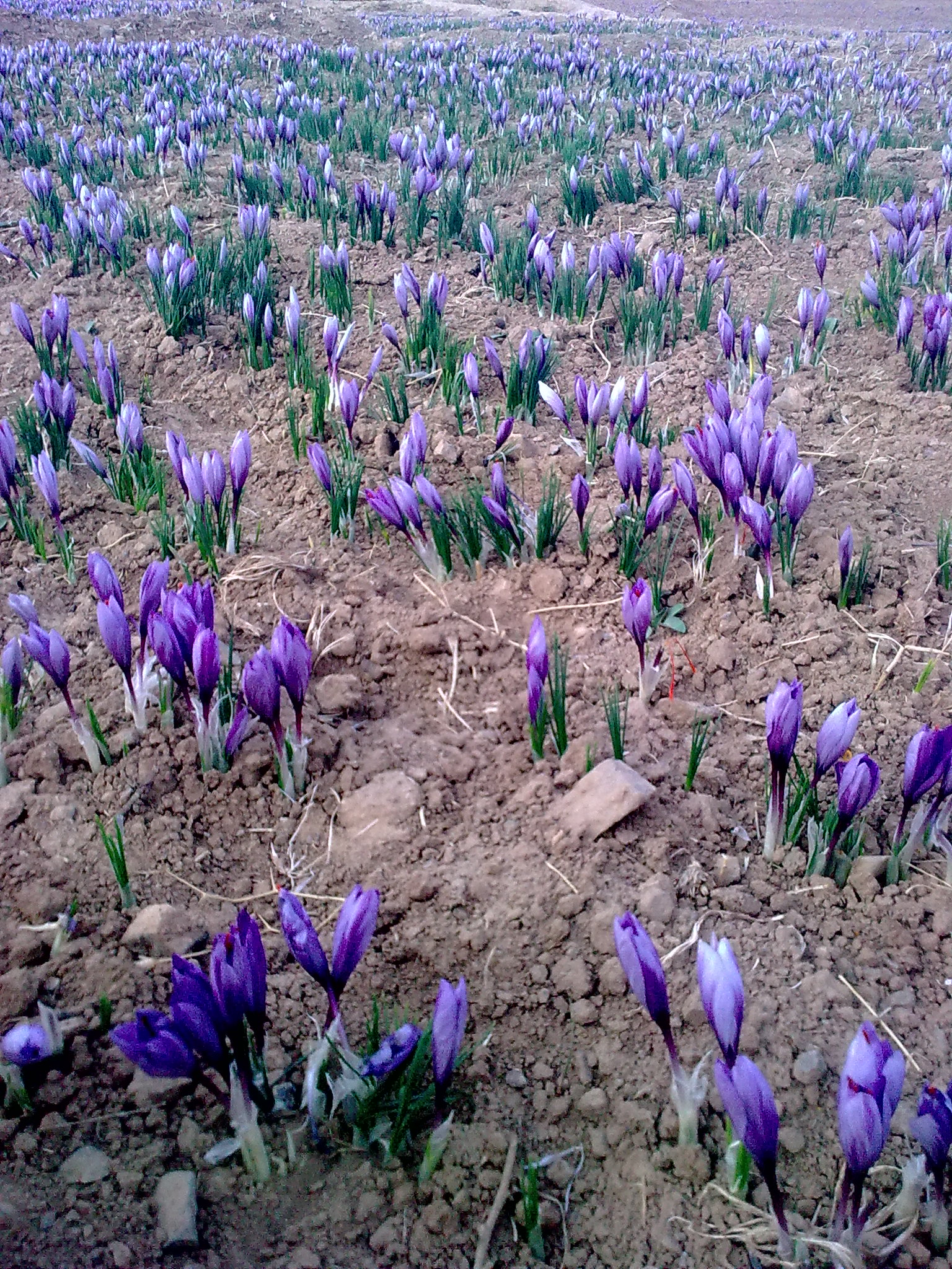 زمین گل زعفران در صبح